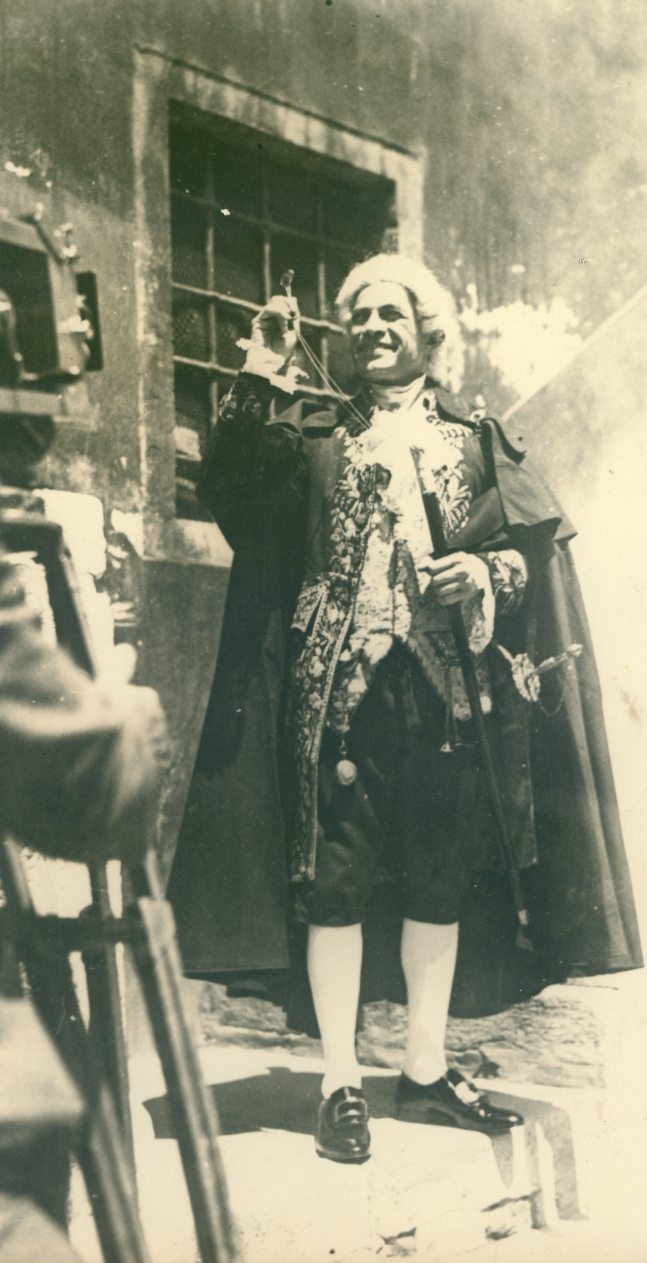 Viviani come Don Marzio nella Bottega del caffé di Goldoni, 1934